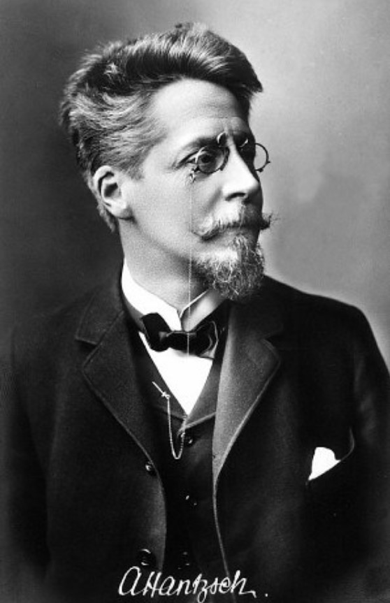 Arthur Hantzsch (* 7. März 1857 in Dresden; † 14. März 1935 in Dresden), Direktor des chemischen Laboratoriums Leibzig, königl. sächs. Geheimer Hofrat.